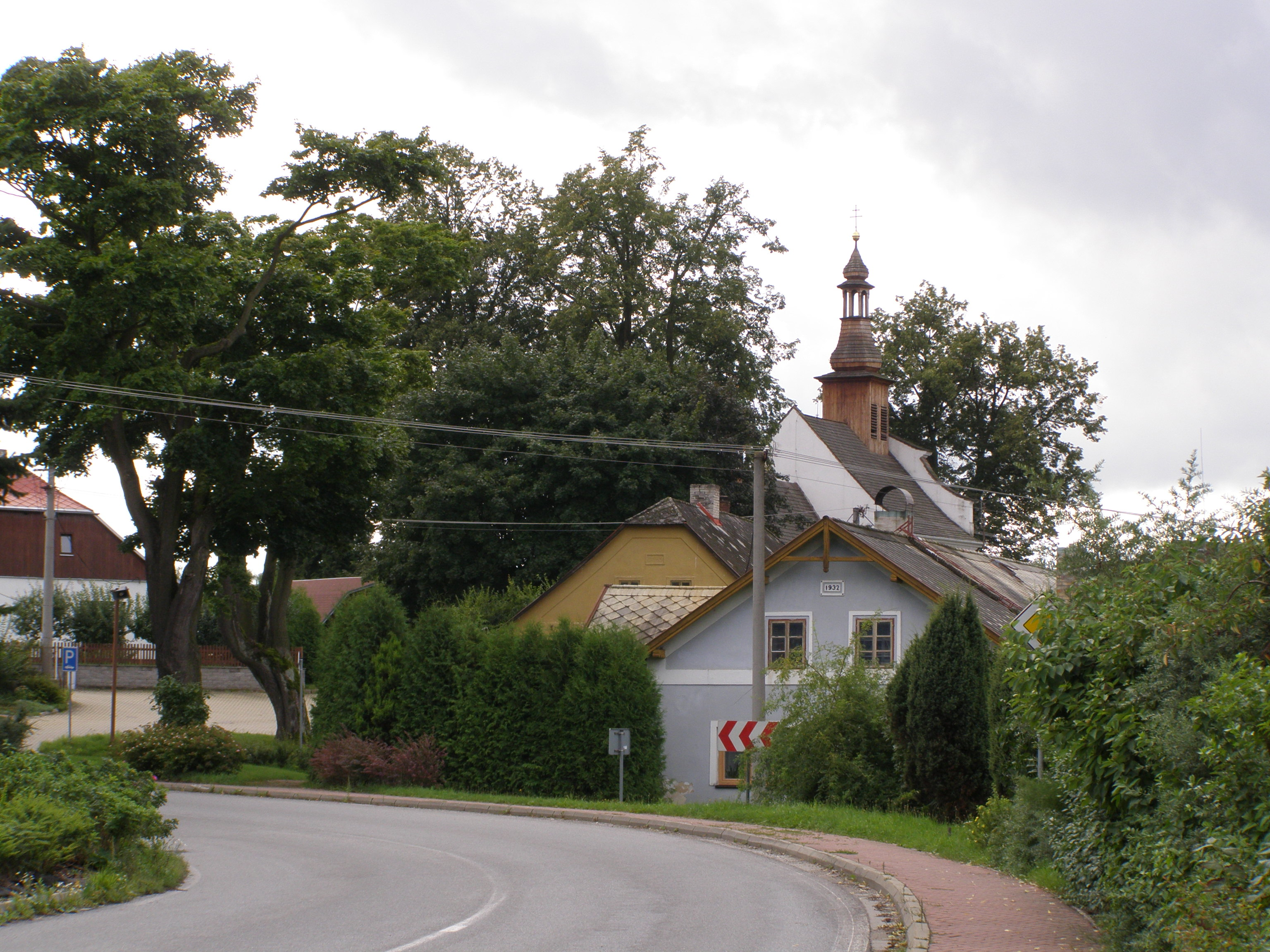 Kostelec, hlavní ulice (silnice Jihlava → Třešť / Horní Cerekev), v pozadí kostel sv. Kunhuty